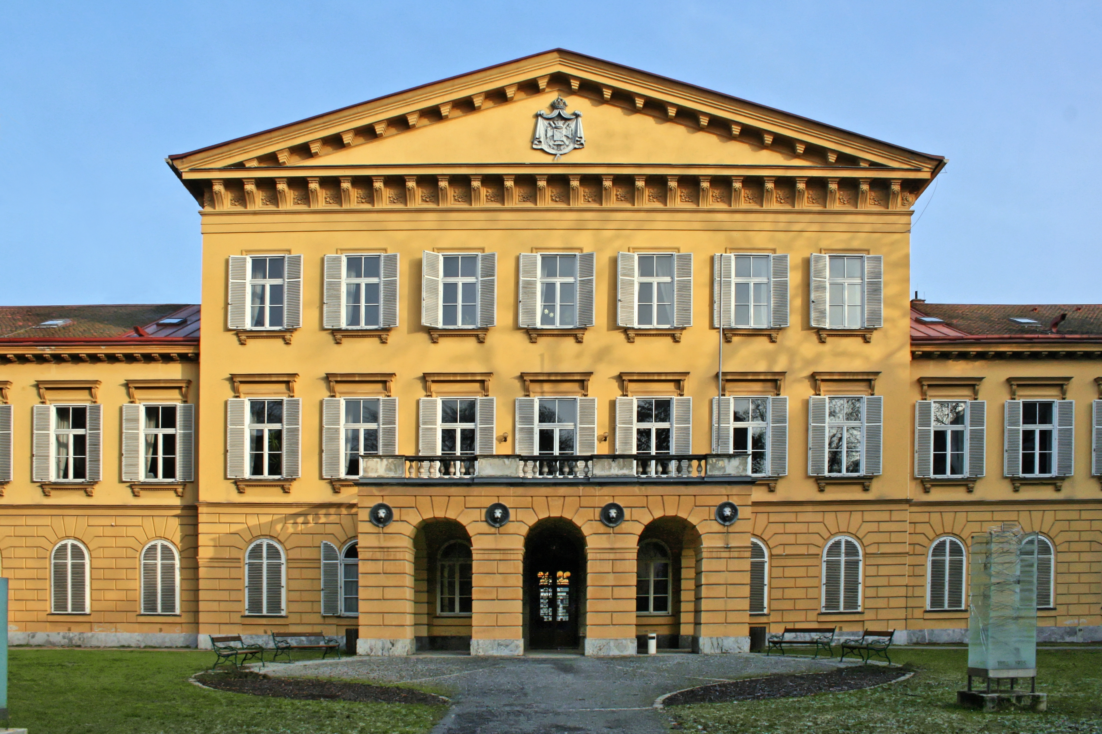 Graz, Austria: Universität für Musik und darstellende Kunst Graz